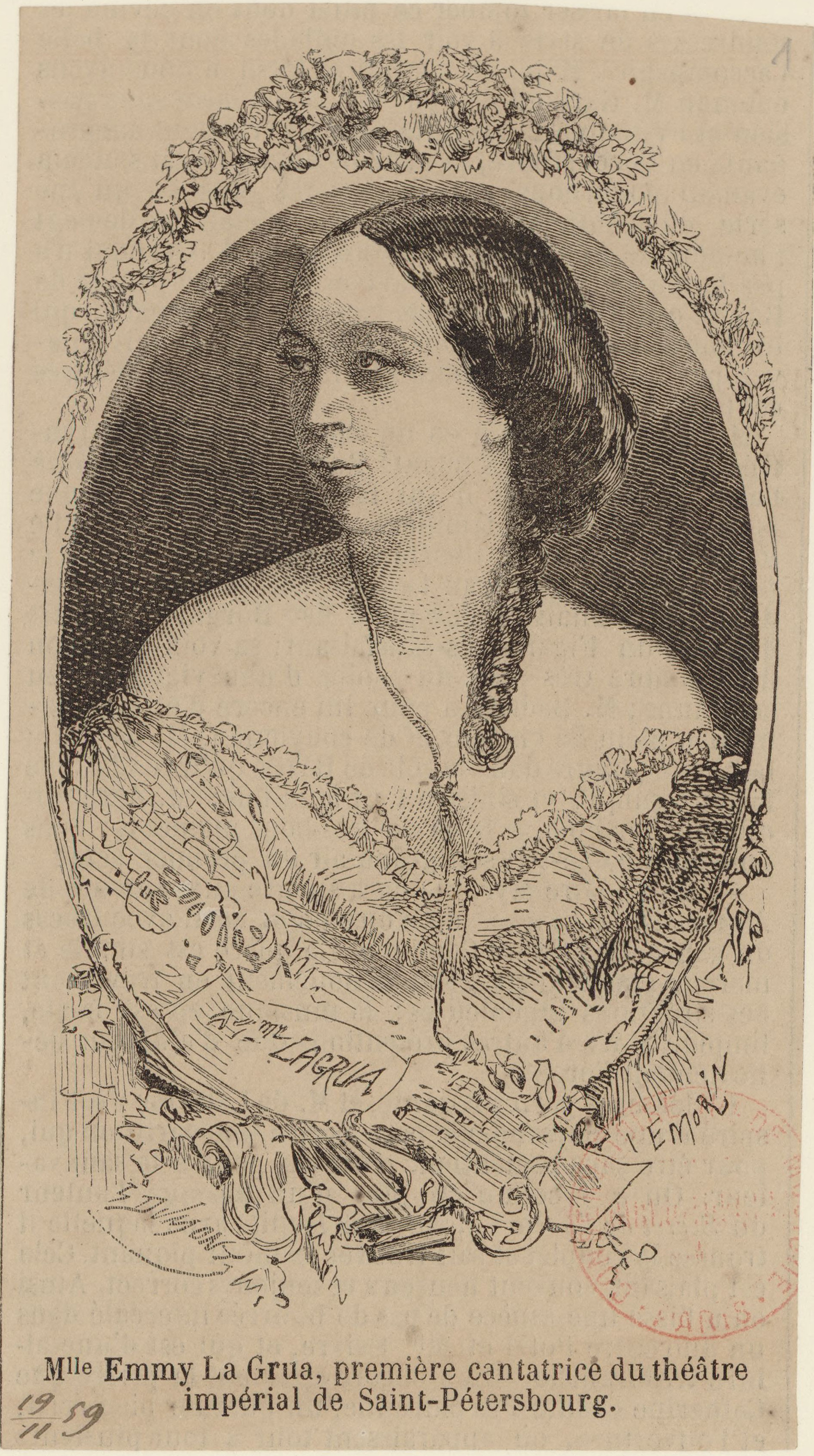 Emma La Grua, première cantatrice du théâtre impérial de Saint-Pétersbourg, lithographie (1859).